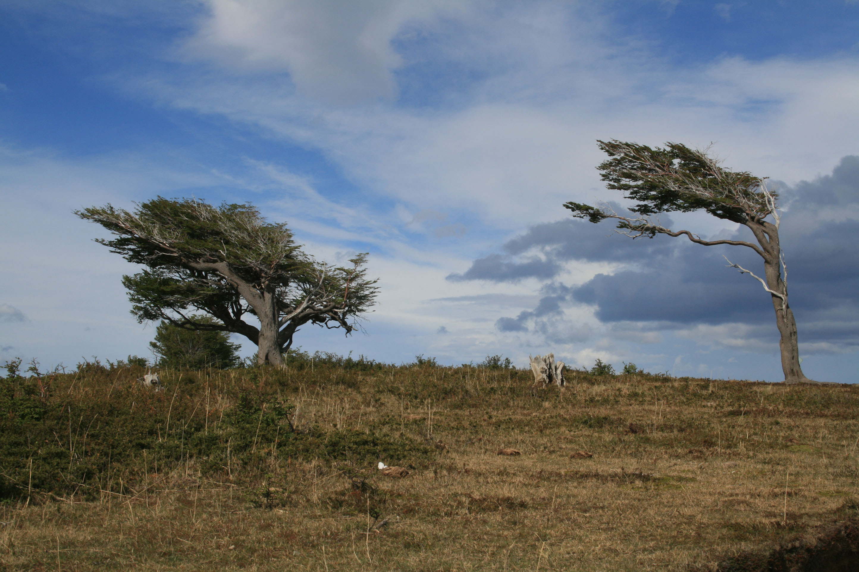 Arboles Bandera